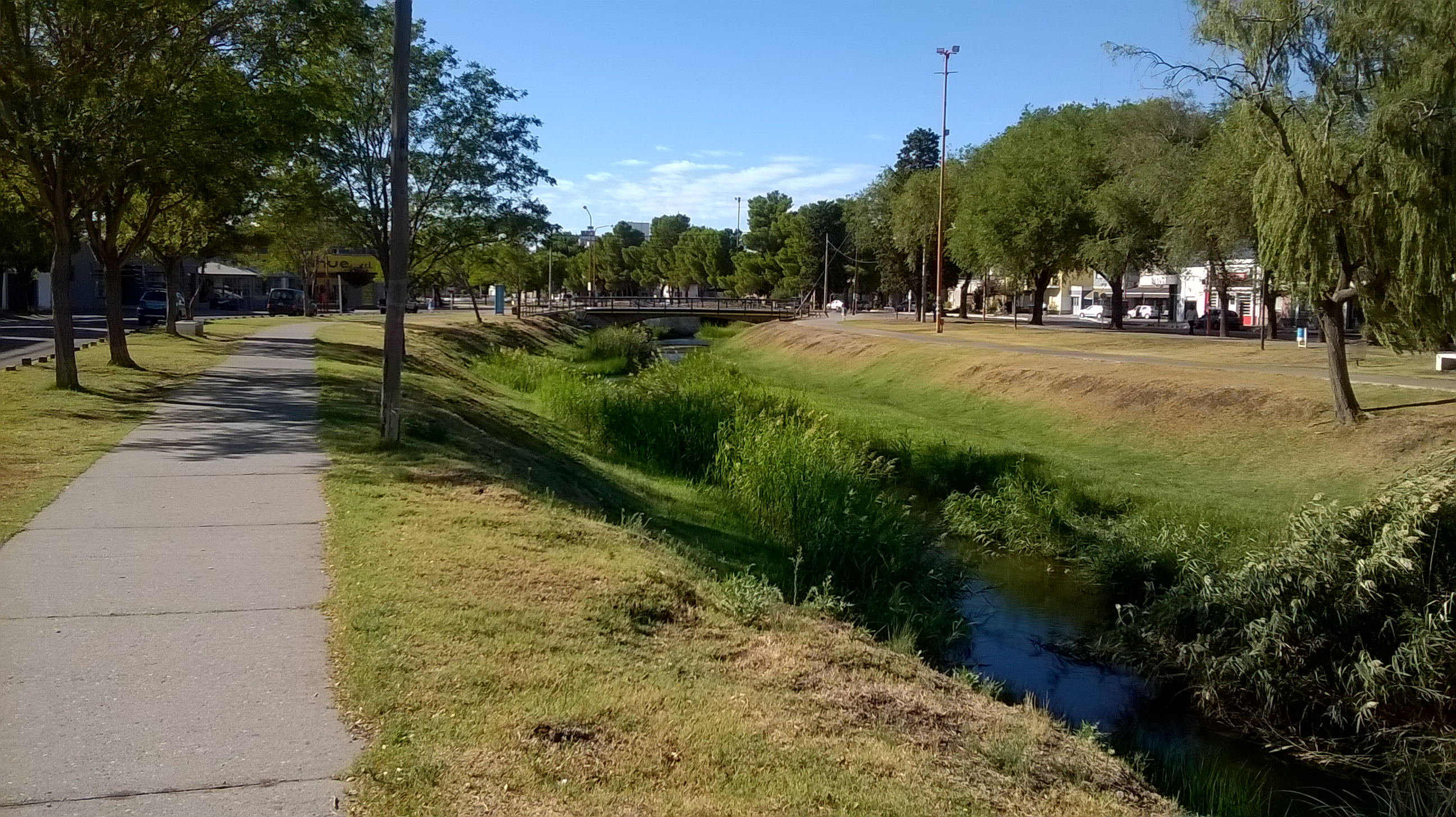 Paso de las Esculturas, Arroyo Napostá